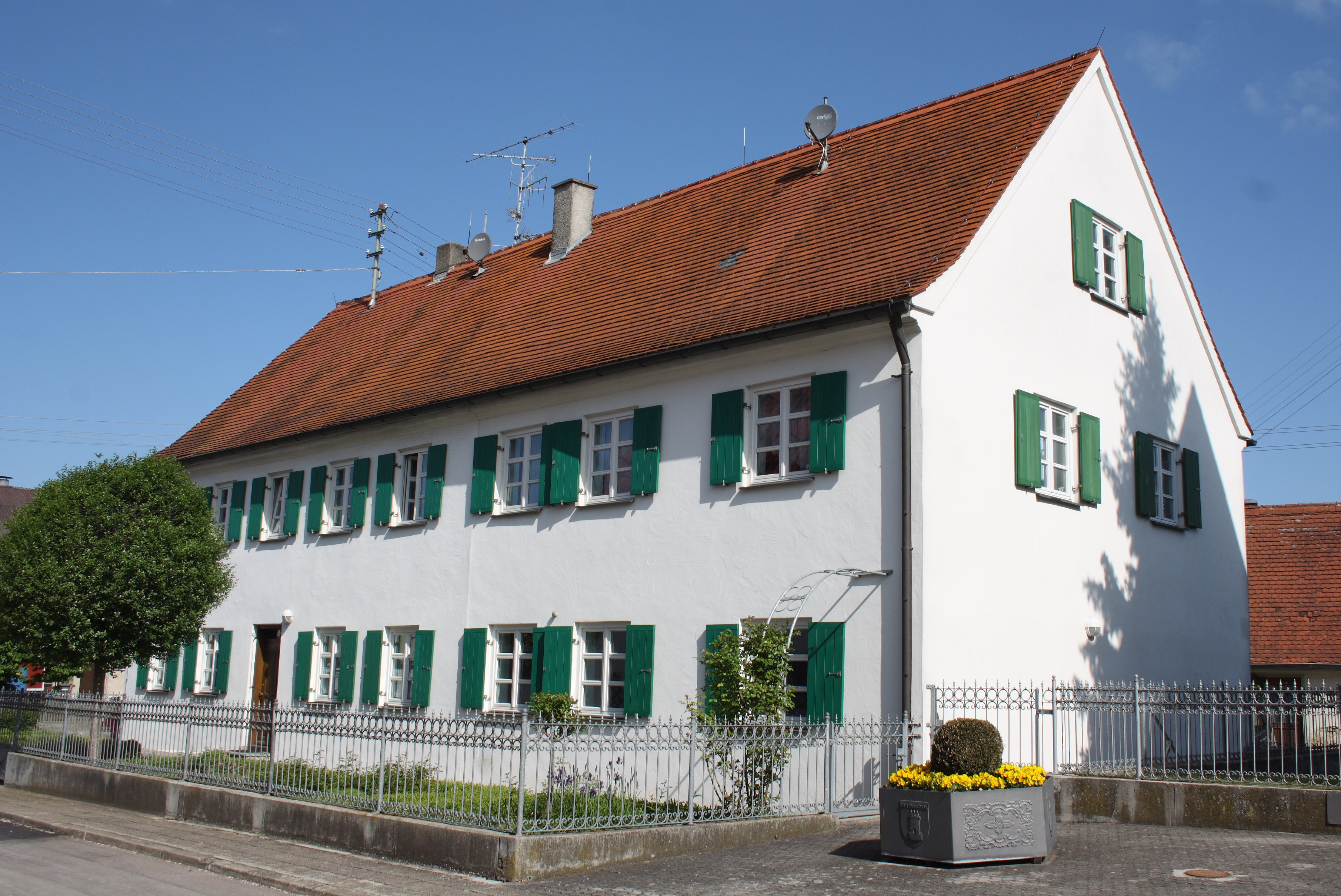 Pfarrhaus in Deisenhofen, einem Stadtteil von Höchstädt an der Donau im Landkreis Dillingen an der Donau (Bayern), um 1761